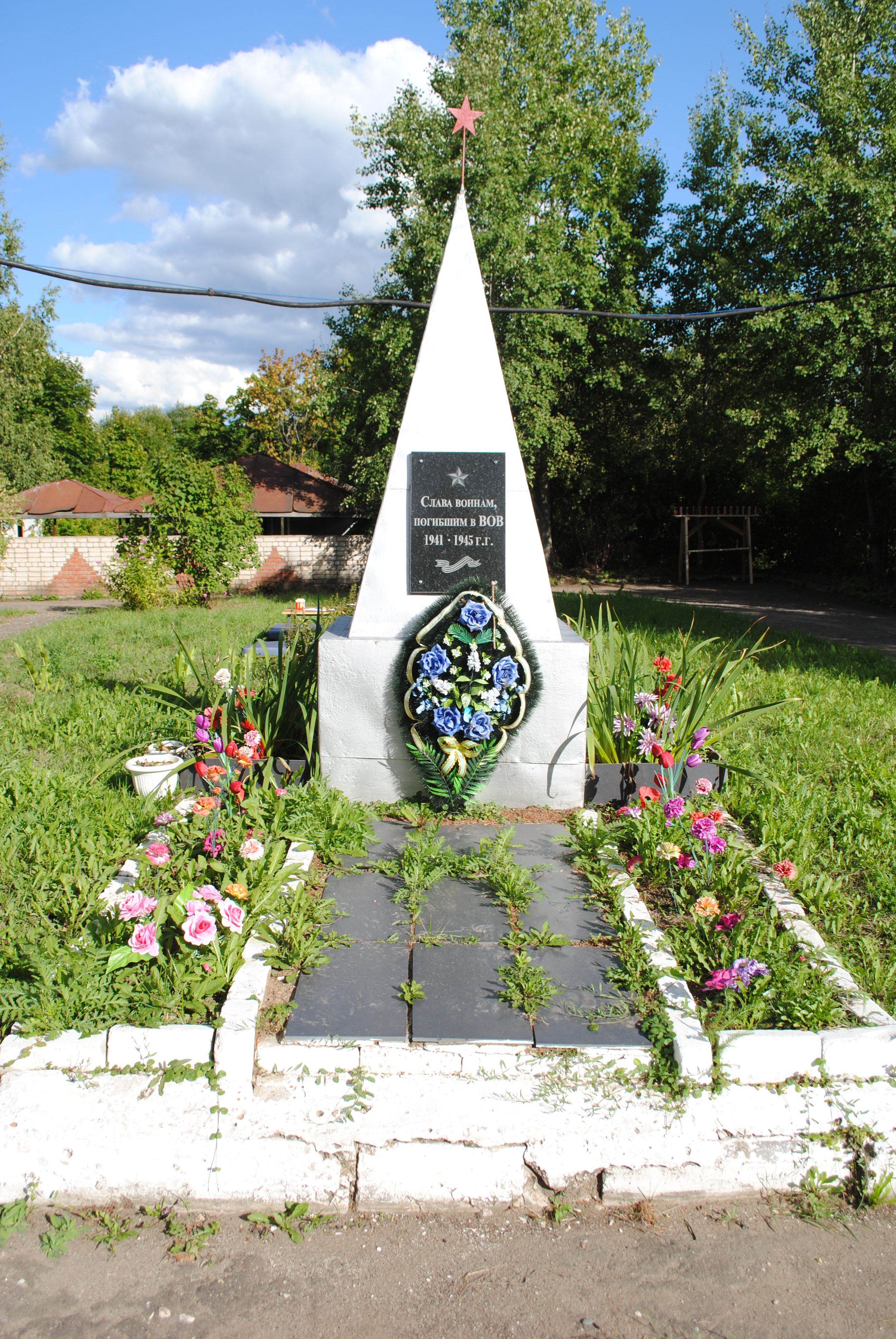 Памятник жителям деревни Легково (Владимирская область), погибшим во время Великой Отечественной войны